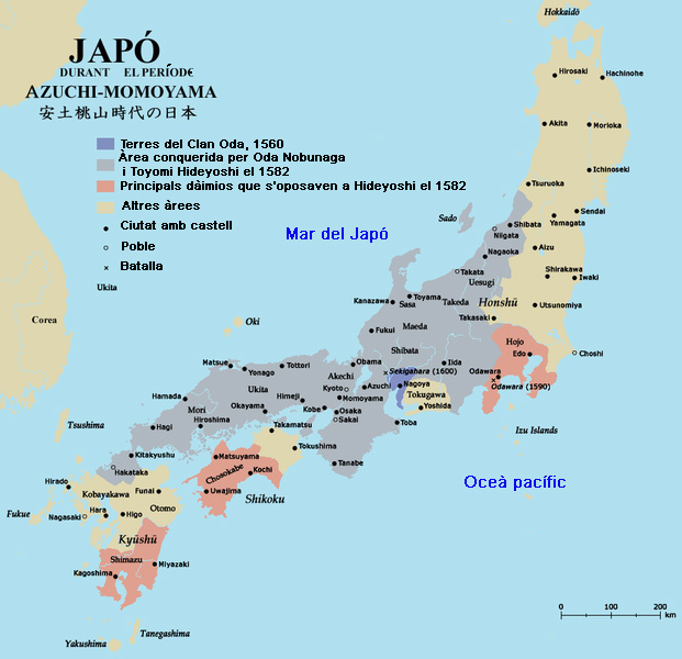 mapa històric del Japó